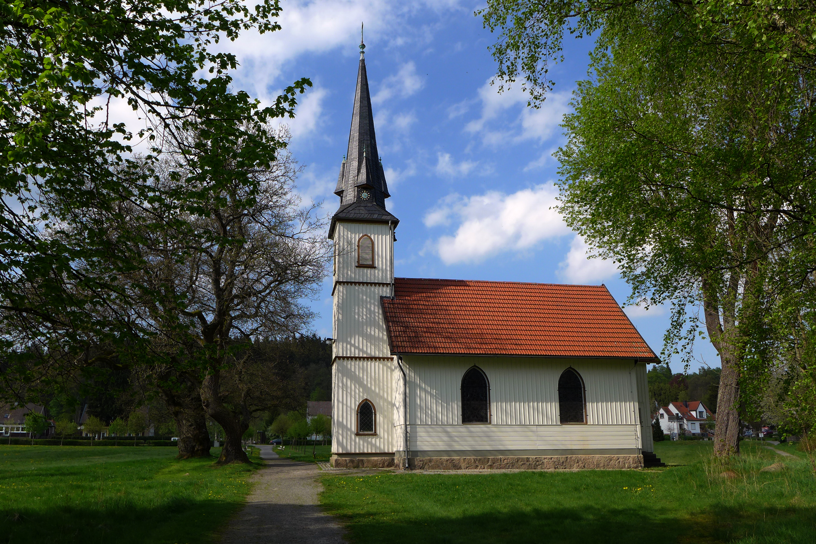 Elend ist ein schöner Ort im Harz an der Bahnstrecke der Harzquerbahn.